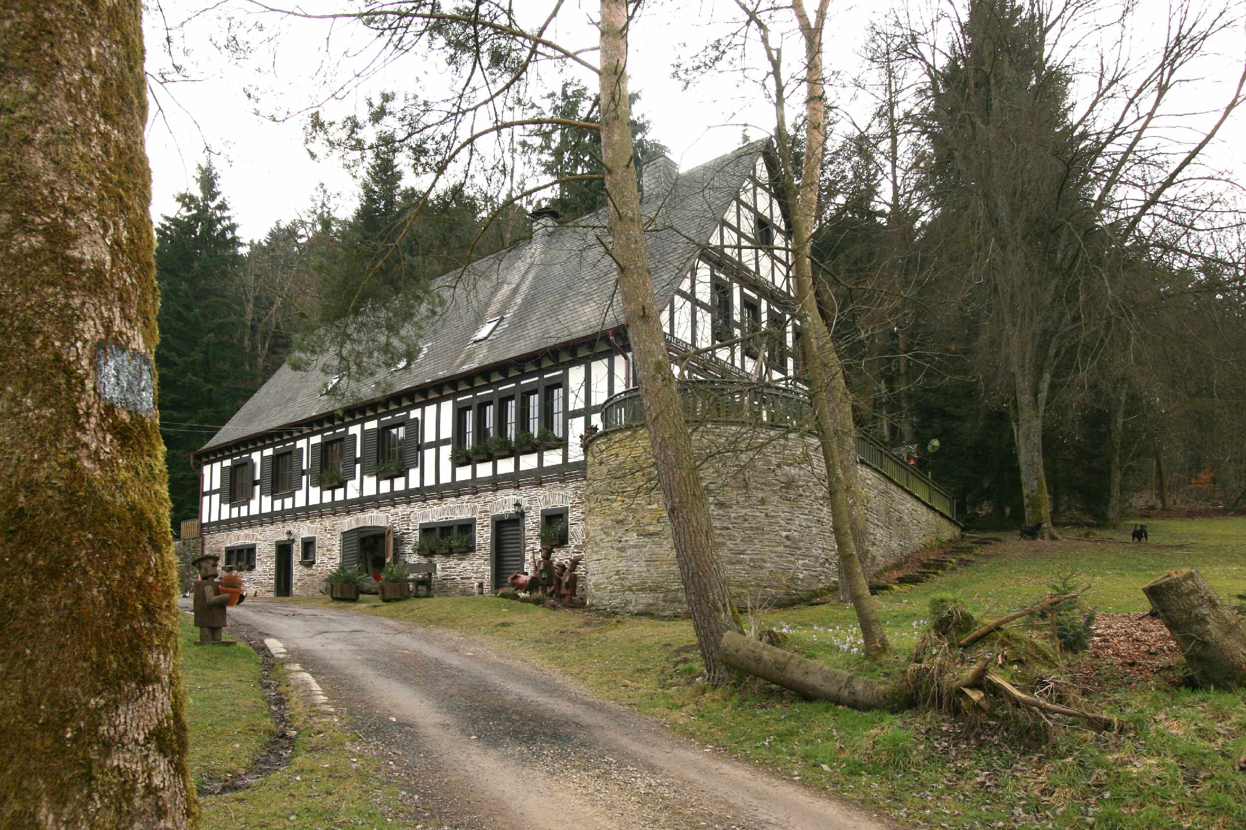 Forsthaus Dahm oberhalb des Ahauser Stausees